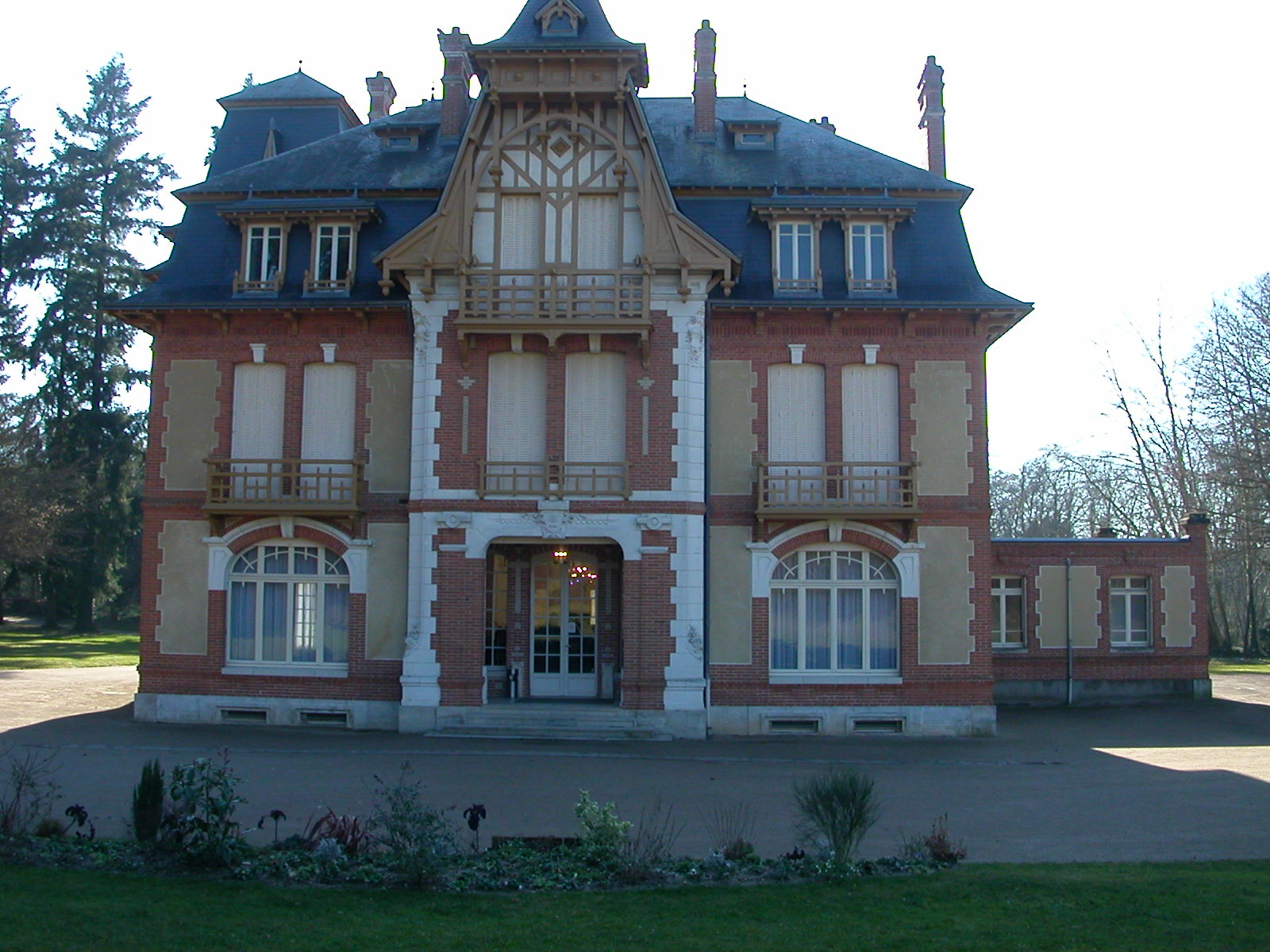 Château de Morchêne, Saint-Cyr-en-Val, Loiret, Centre, France